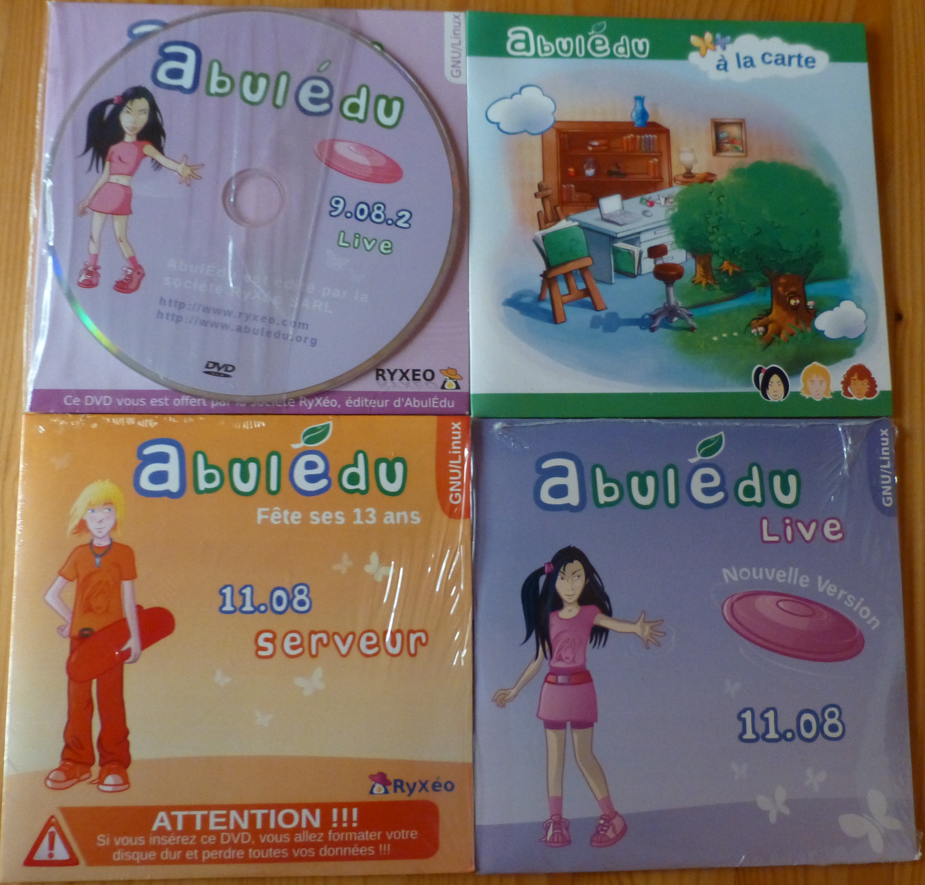 Anciennes versions d'AbulÉdu.